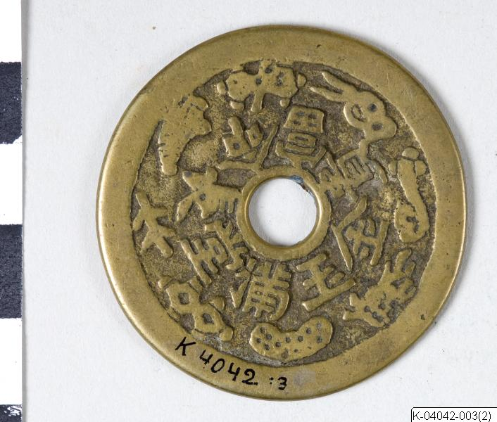 Amulettmynt. Sitter sammanbundet med K-04042-002, 005 och 006 K-04042-003 China.